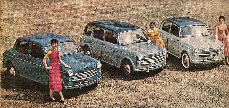 Immagine ottenuta per scannerizzazione della pagina 18 del fascicolo speciale edito dall'A.N.F.I.A.A. (Associazione Nazionale Fra Industrie Automobilistiche e Affini) nell'aprile 1955 in occasione del Salone dell'Automobile di Torino Categoria:Immagini di automobili italiane Categoria:Immagini di automobili in Italia